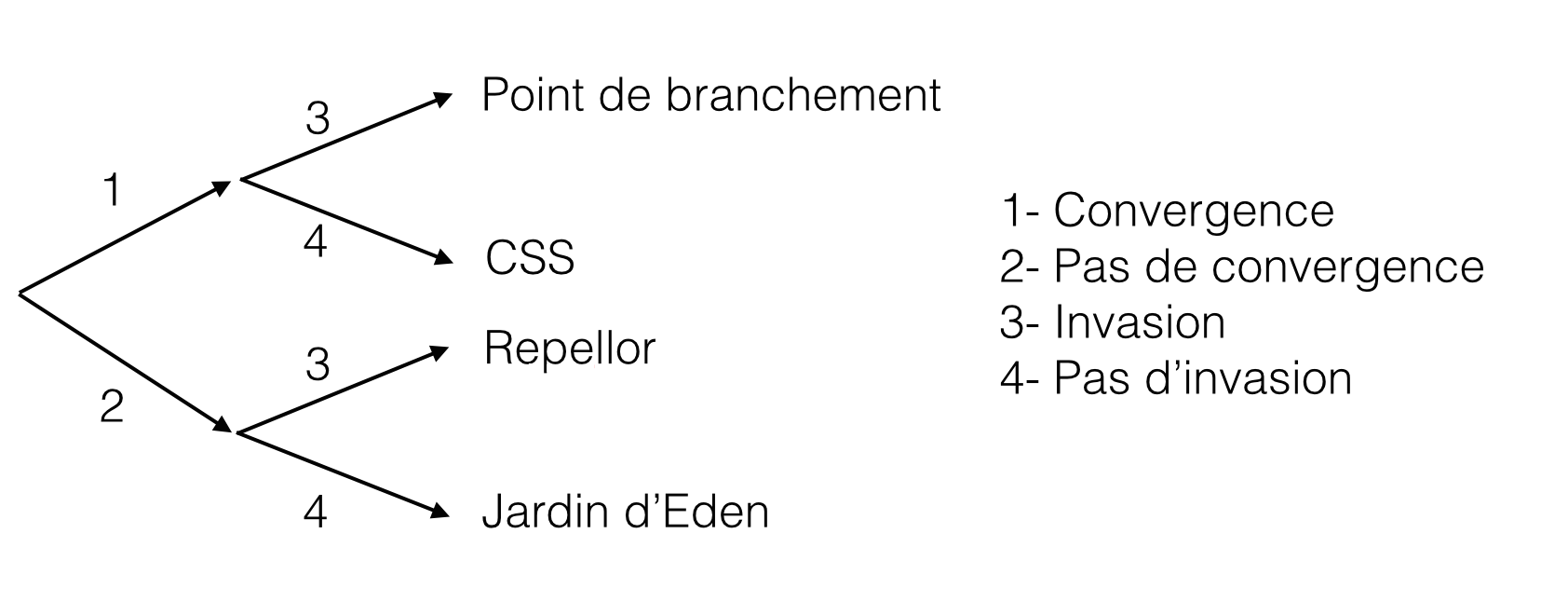 Ordonnancement des PIP